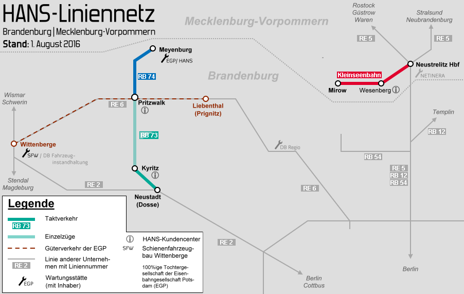 Liniennetz der Hanseatischen Eisenbahn seit 1. August 2016